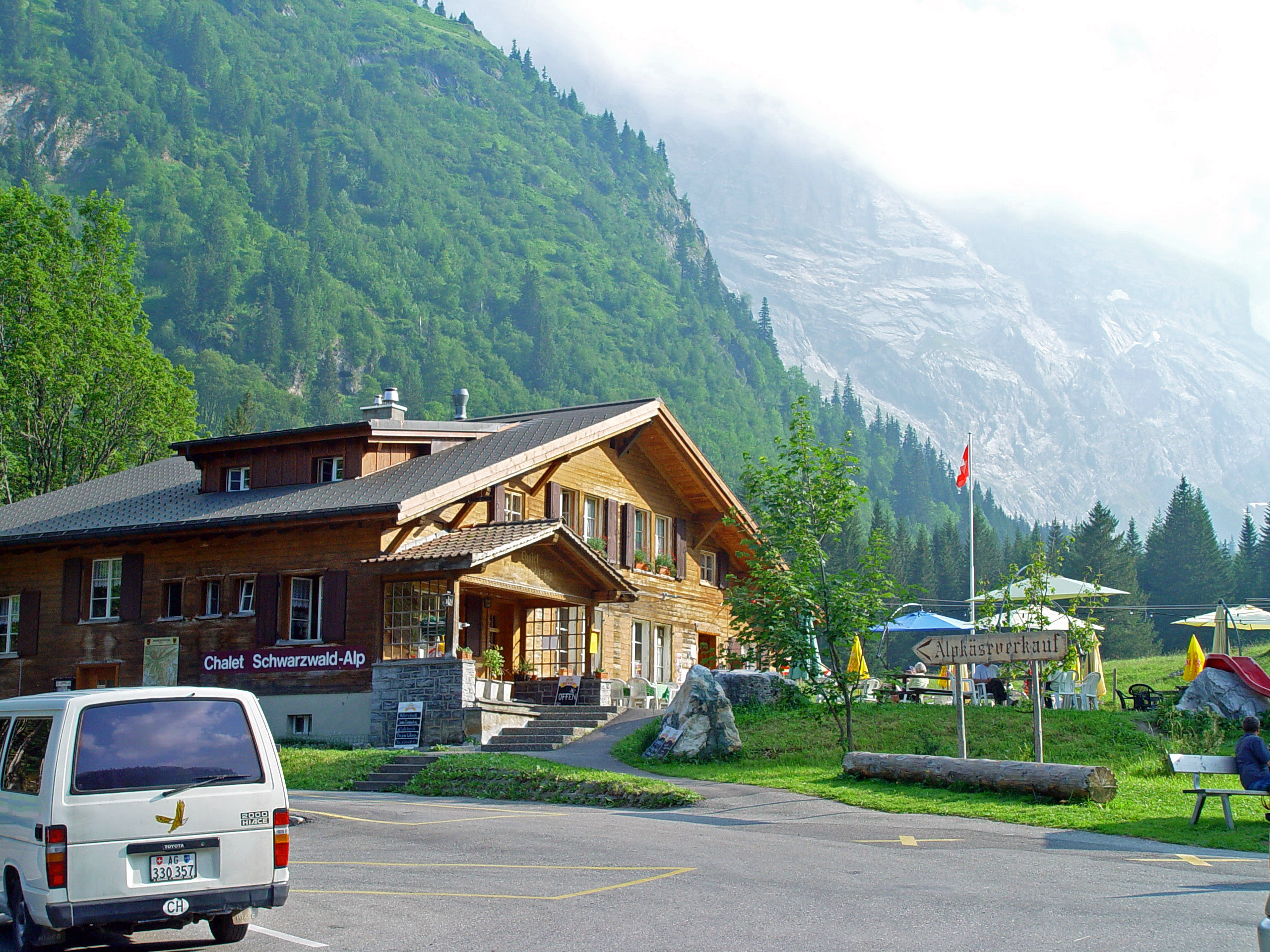 Schwarzwaldalp im Juli